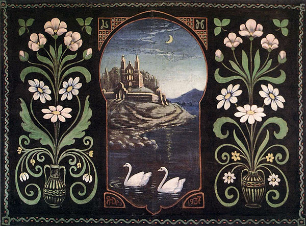 1937 г. Матэр'ял і тэхніка палатно, алей Памеры 130 х 200 Паходжанне Глыбоцкі р-н, Віцебская вобл. Месцазнаходжанне Гісторыка-культурны музей-запаведнік "Заслаўе"